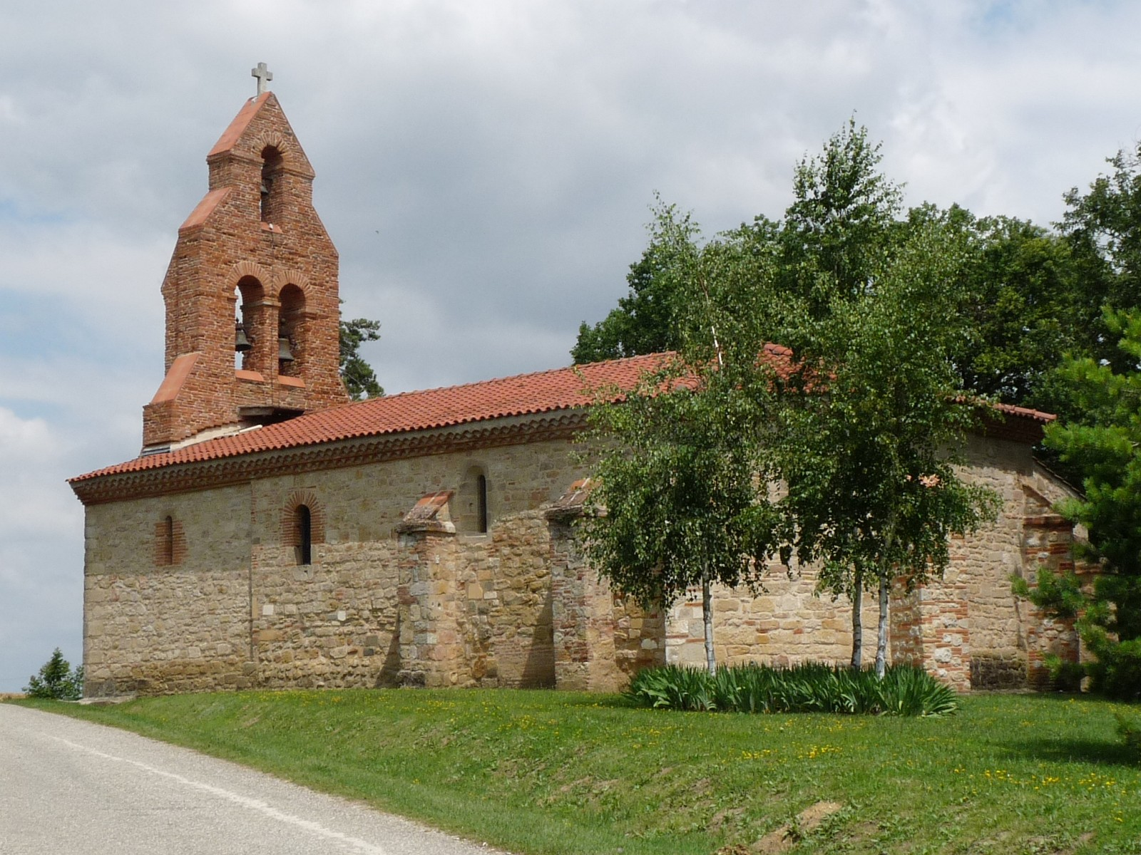 Eglise de Prunet, Haute-Garonne, France